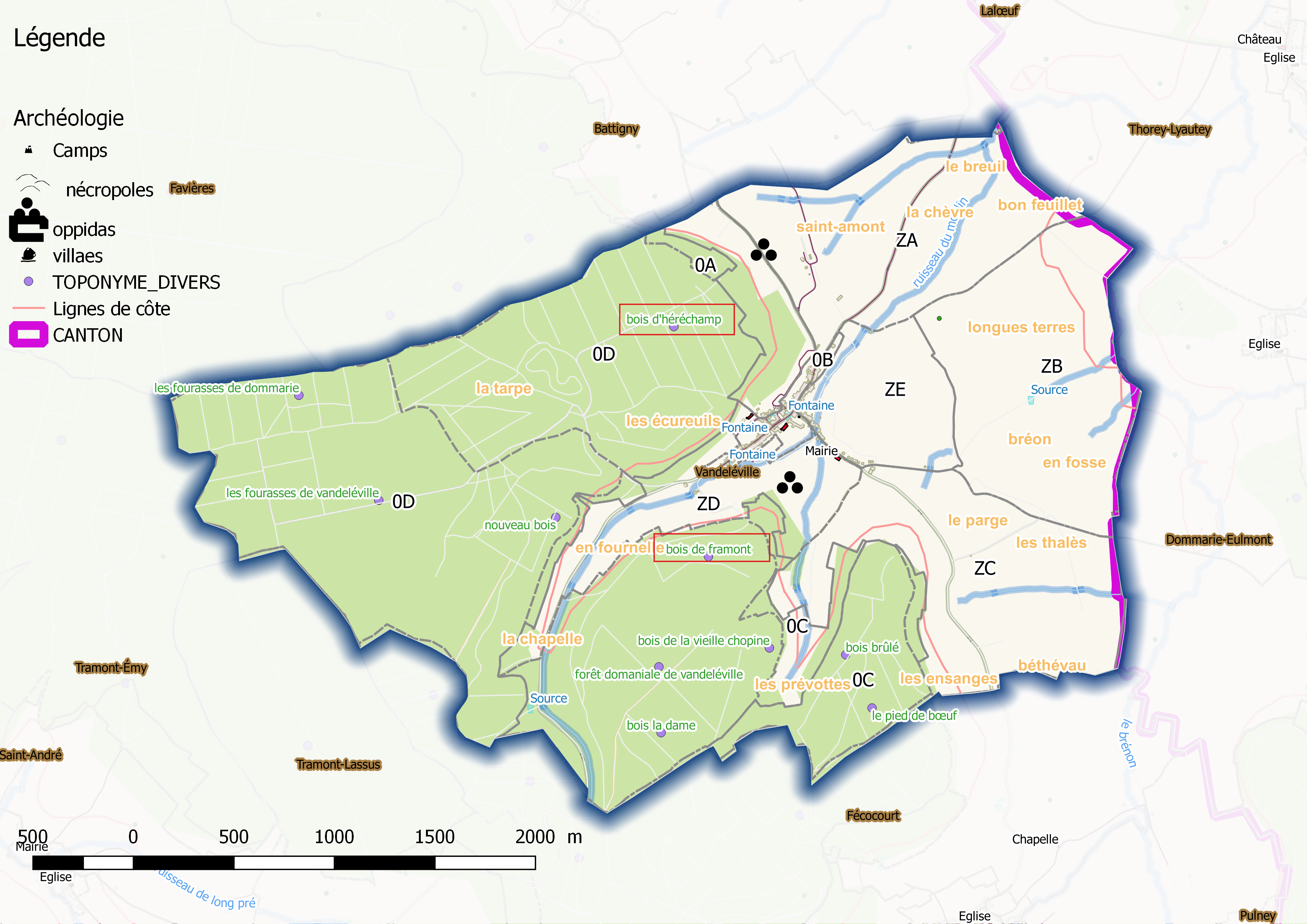 Vandeleville - ban communal (Osm, Qgis et mentions manuscrites)